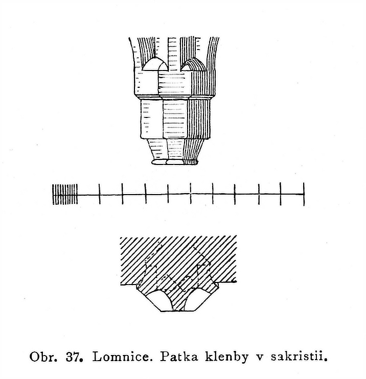 Lomnice, patka klenby v sakristii.